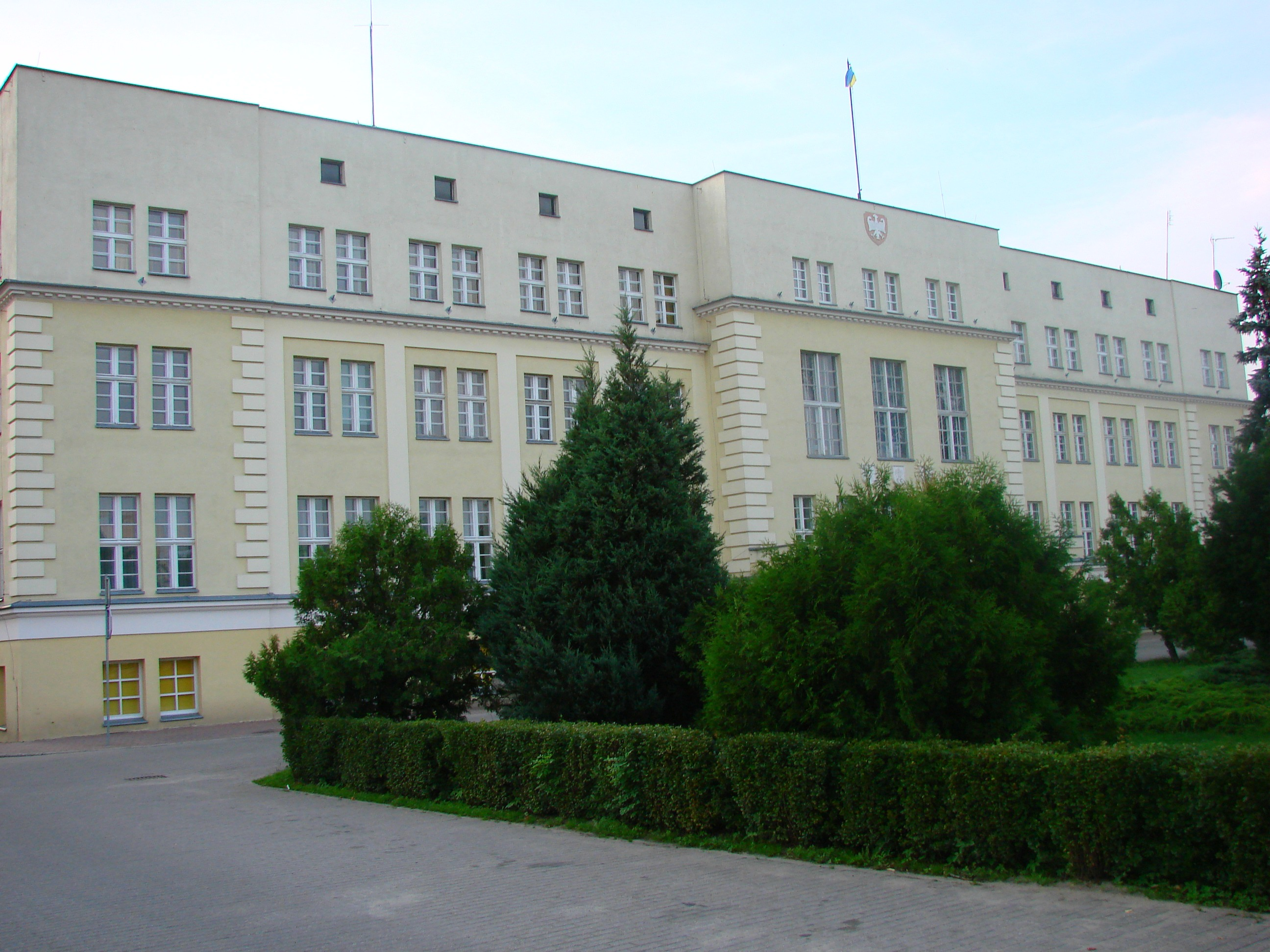 Ratusz; Urząd Miasta i Gminy Sępólno Krajeńskie, Starostwo Powiatu Sępoleńskiego przy ul. T. Kościuszki.